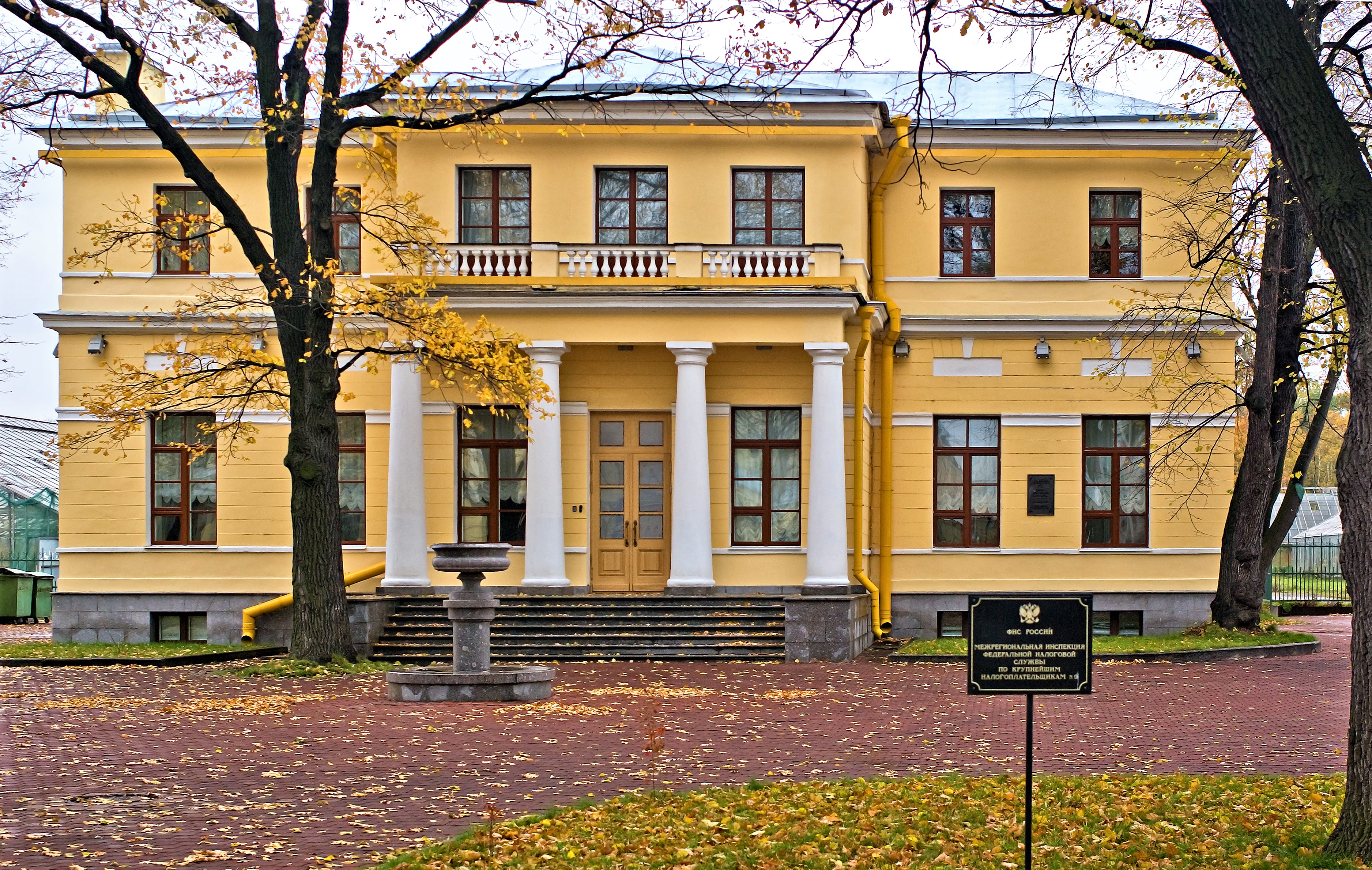 Потёмкинская ул. дом 2 (межрегиональная инспекция федеральной налоговой службы по крупнейшим налогоплательщикам №1, ФНС России).